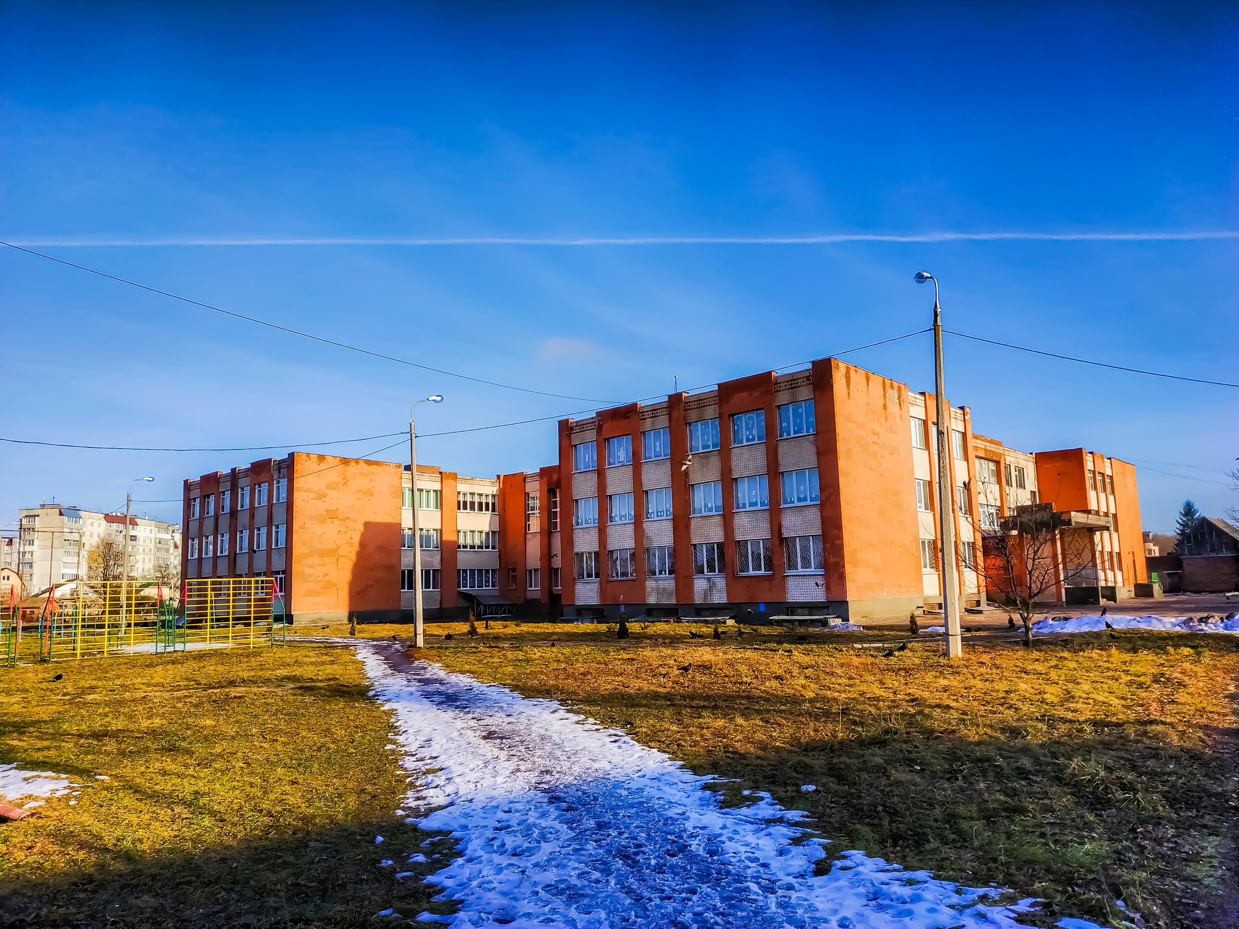 Школа №29 у Хмельницькому, вулиця Вокзальна, 16